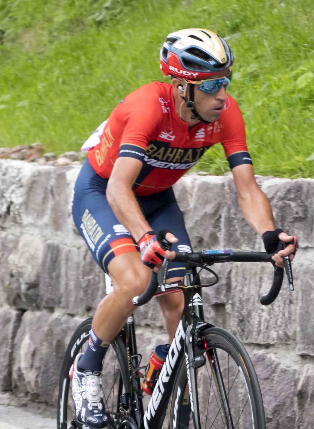 DSC03116 nibali